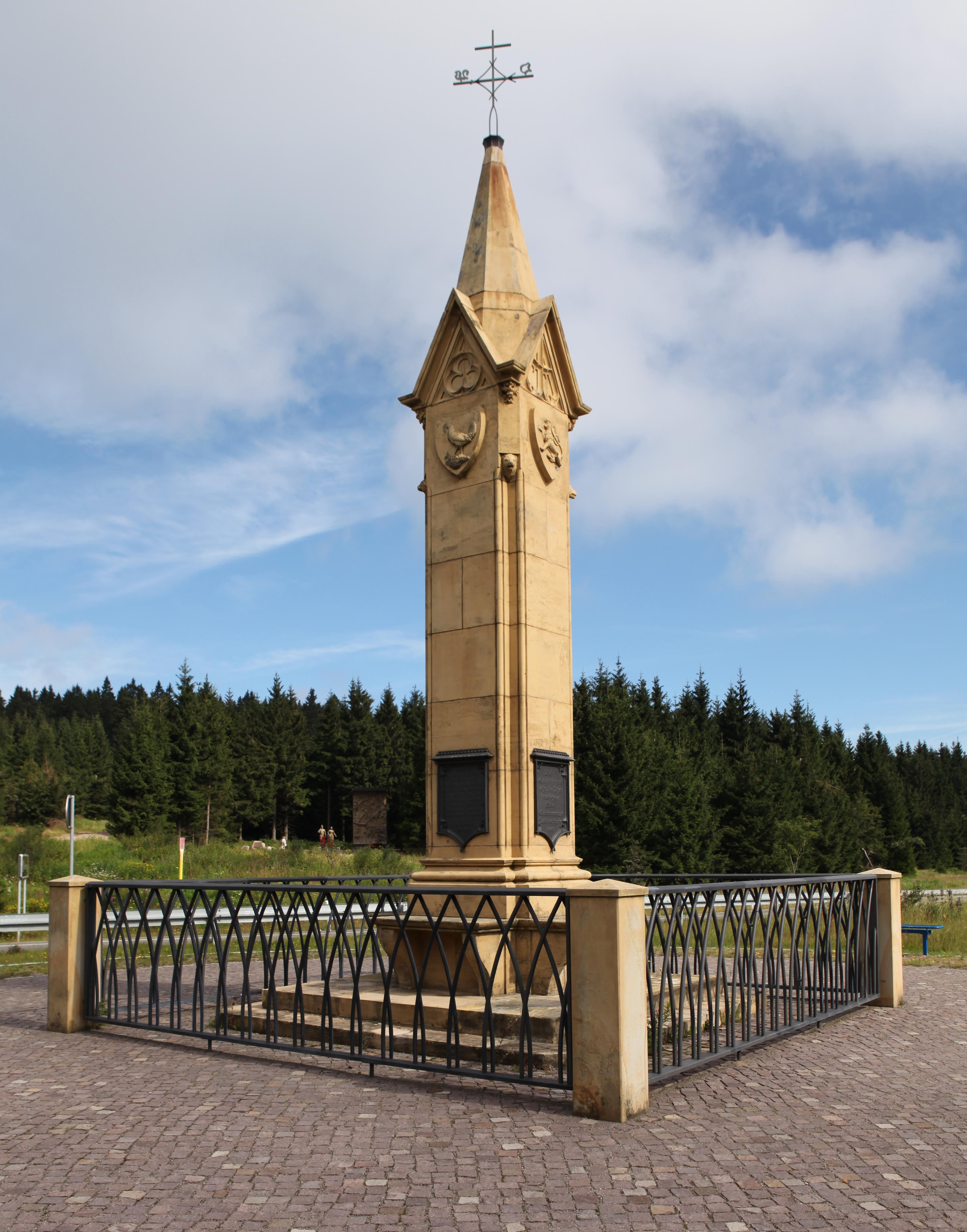 Obelisk am Rondell bei Coburg Namensnennung: Störfix